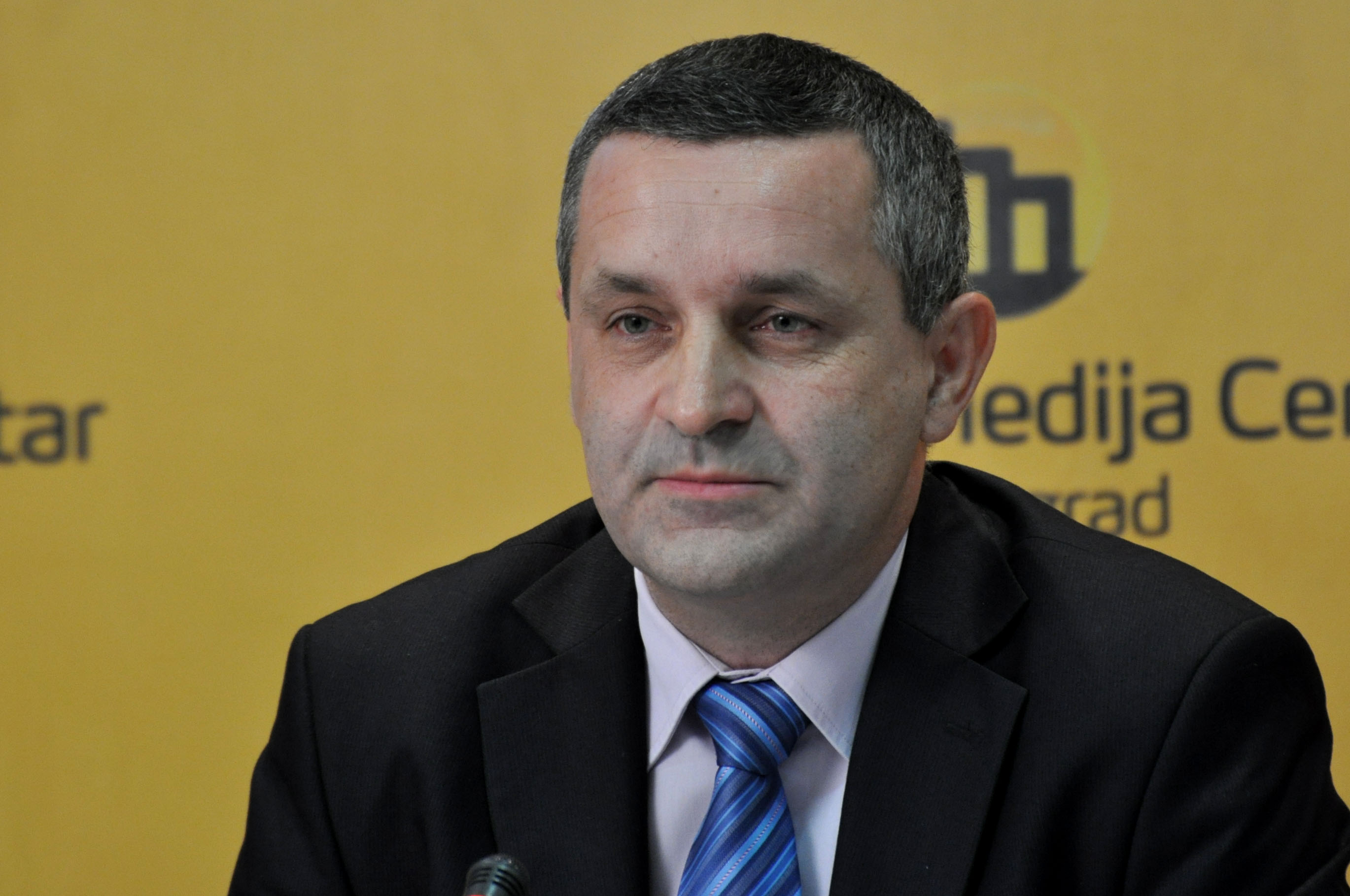 Миодраг Линта српски политичар и активиста